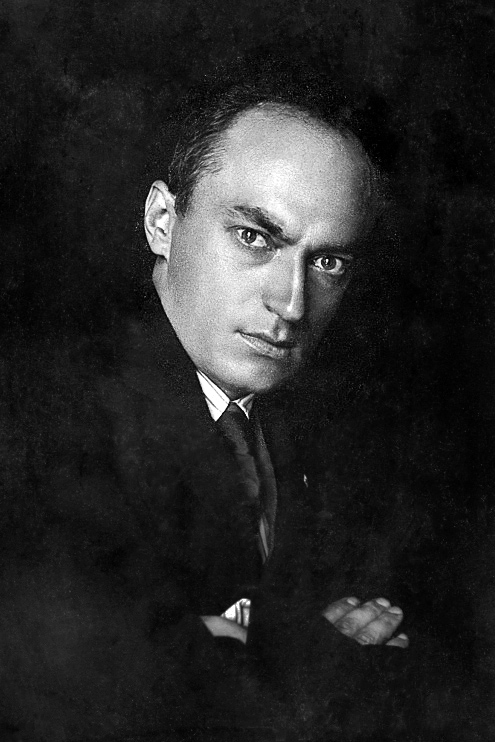 Kalman Kalocsay, 1921. Porträtfoto